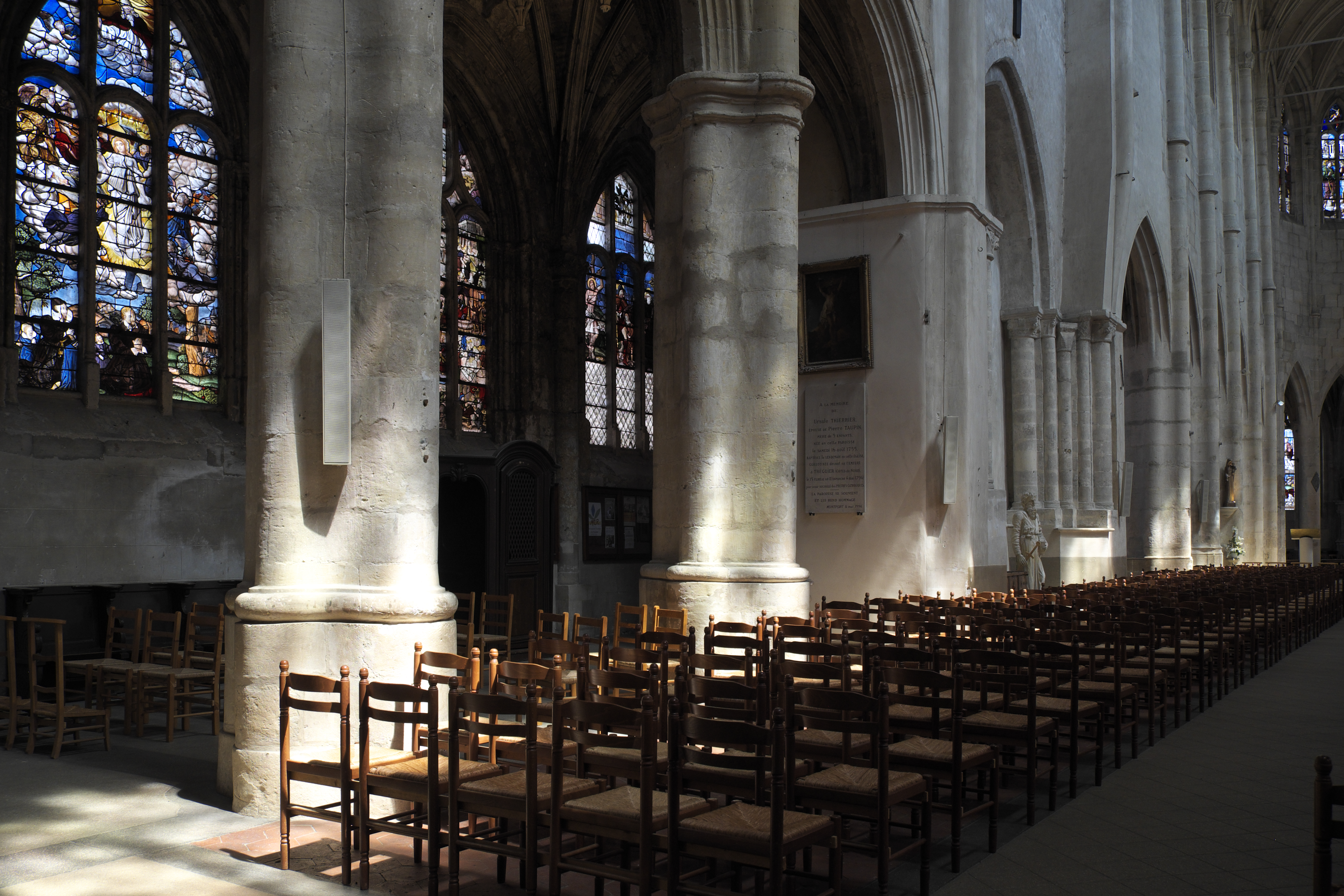 Katholische Pfarrkirche Saint-Pierre in Montfort-l'Amaury im Département Yvelines (Region Île-de-France/Frankreich), Innenraum, Mittelschiffarkaden